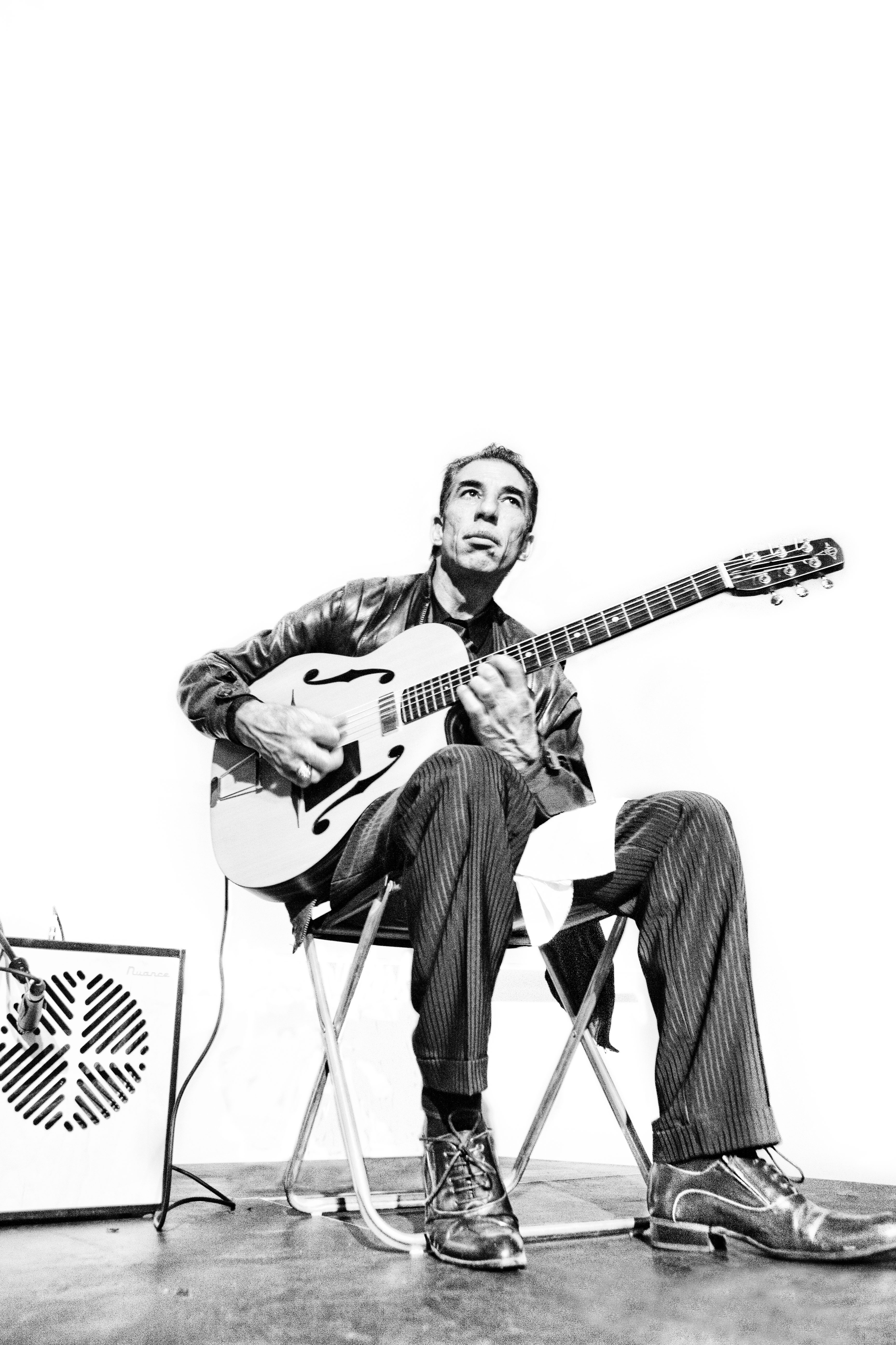 Angélo Debarre pendant le concert du vendredi soir au Paris Jazz Roots Festival à la Belleviloise, Paris.